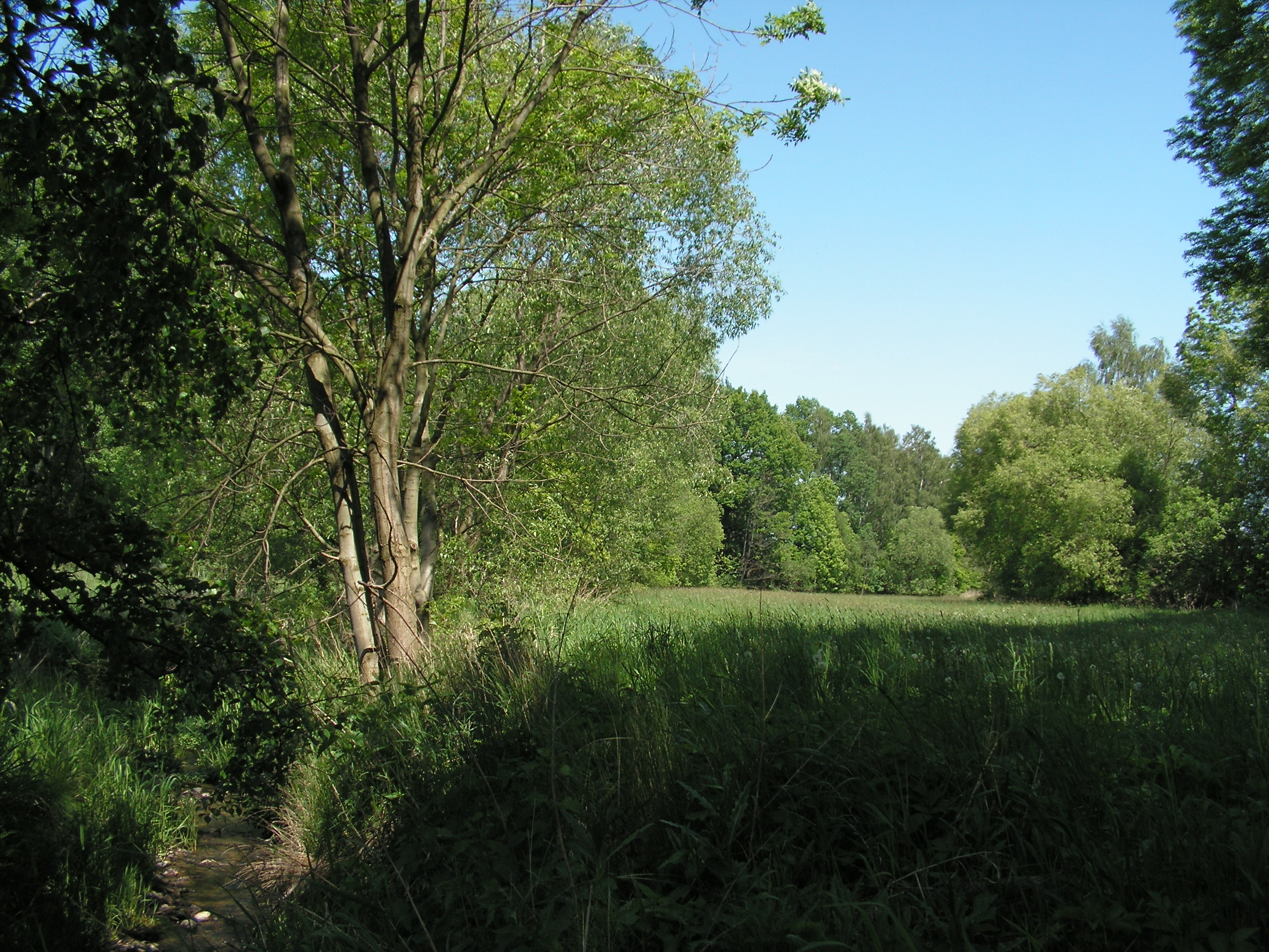 Mělké údolí Krchlebského potoka severně od Krchlebské Lhoty v okrese Kutná Hora.